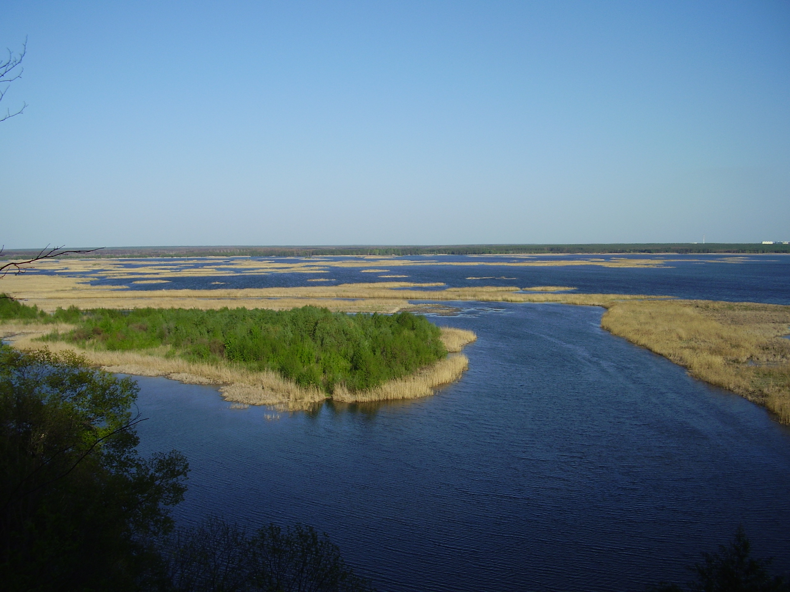 Островки на Воронежском водохранилище